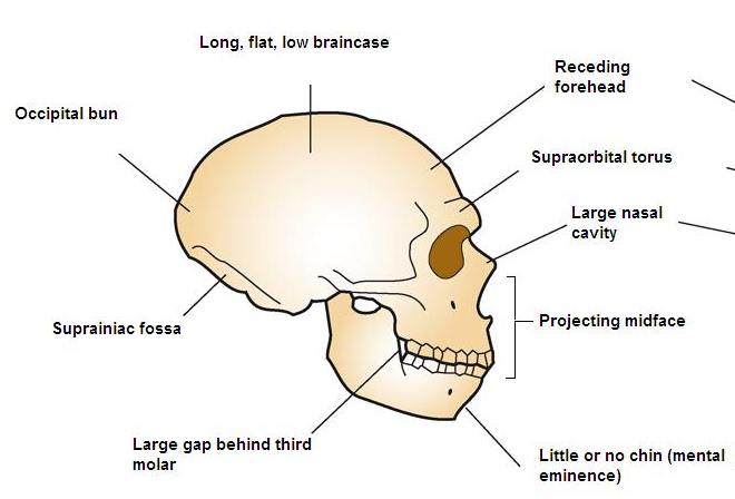 Occipital bun